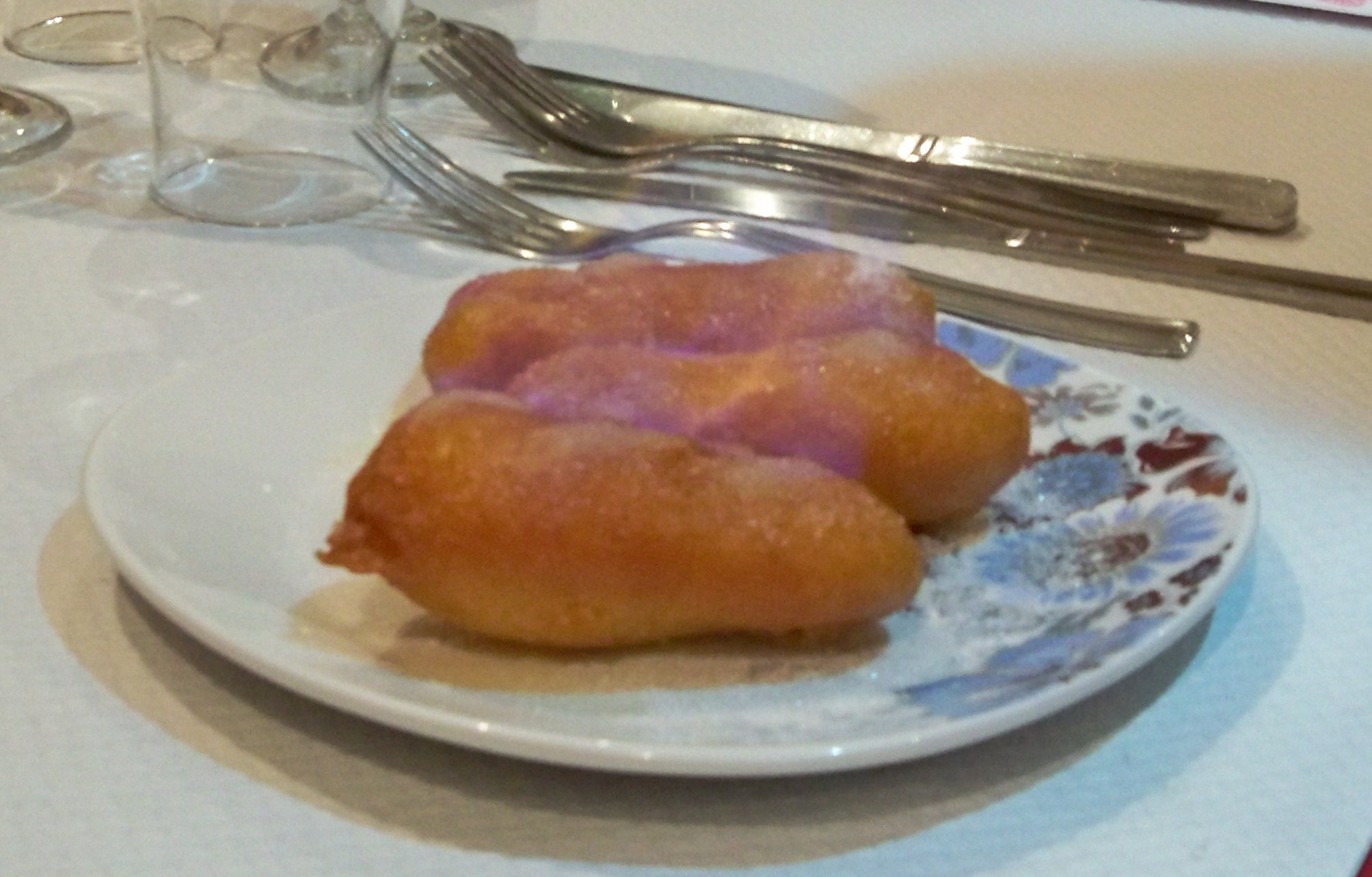 baignets de bananes flambées